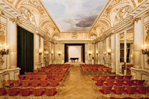 Spiegelsaal aus dem Budge-Palais im Museum für Kunst und Gewerbe Hamburg. Der Spiegelsaal wurde 1909 in den Budge-Palais (heutige Hochschule für Musik und Theater, kurz Musikhochschule) im Neorokoko-Stil eingebaut. Während des Nationalsozialismus wurde der Budge-Palais den jüdischen Erben entschädigungslos vorenthalten. Ende der 1970er-Jahre wurde der Spiegelsaal anlässlich des Umbaus der Musikhochschule vor dem Abriss gerettet. Er wurde vom Museum für Kunst und Gewerbe in den nördlichen Innenhof übernommen. Das Deckengemälde des Spiegelsaals stammt aus dem Jahr 2005 von dem Maler Klaus Fußmann. Heute finden im Spiegelsaal Musikaufführungen statt und er kann für Veranstaltungen gemietet werden. (de wp)